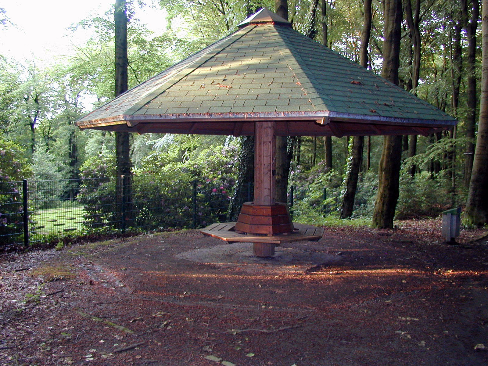 Barmer Anlagen - Wetterpilz